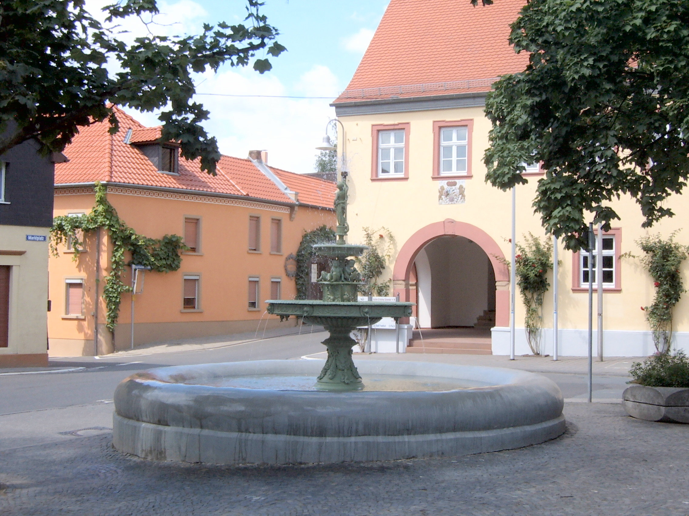 Marktbrunnen von Schwabenheim an der Selz mit Rathaus im Hintergrund